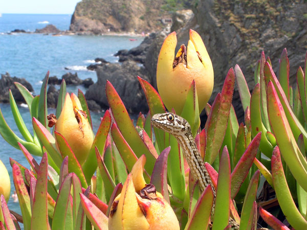 Hagedisslang van wikipedia Hagedisslang (Malpolon monspessulanus), gefotografeerd op 27 juli 2005 door Wim Strik in Frankrijk. Titel: Naar prooi zoekende Hagedisslang Foto: Wim Strik, 27-07-2005 in Frankrijk Licentie: GNU Vrije Documentatie Licentie Beschrijving: Ik heb de foto gemaakt tijdens mijn vakantie in Zuid-Frankrijk, ik wilde over de muur vanaf een terras een foto van de de zee maken toen hij ineens luid sissend voor mij stond, pas toen ik een stap achteruit deed ging hij er razendsnel vandoor.